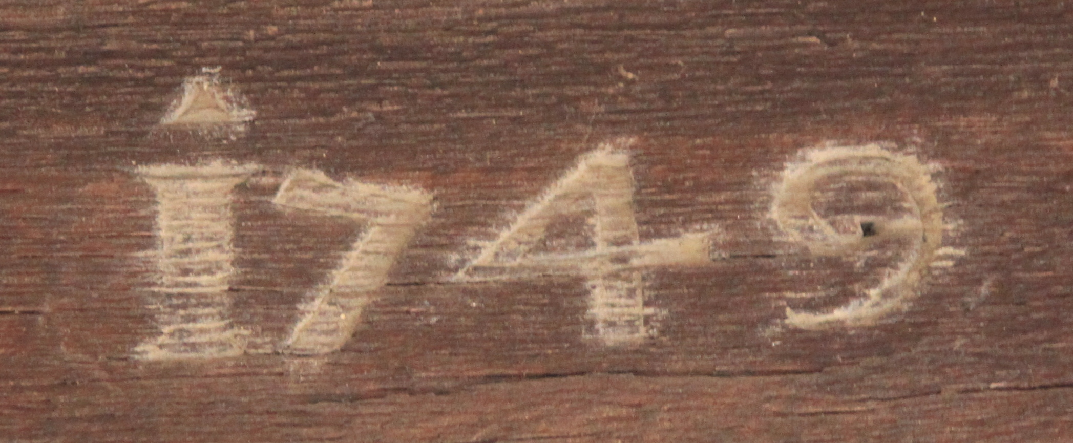 Dintell d'una casa de Besalú